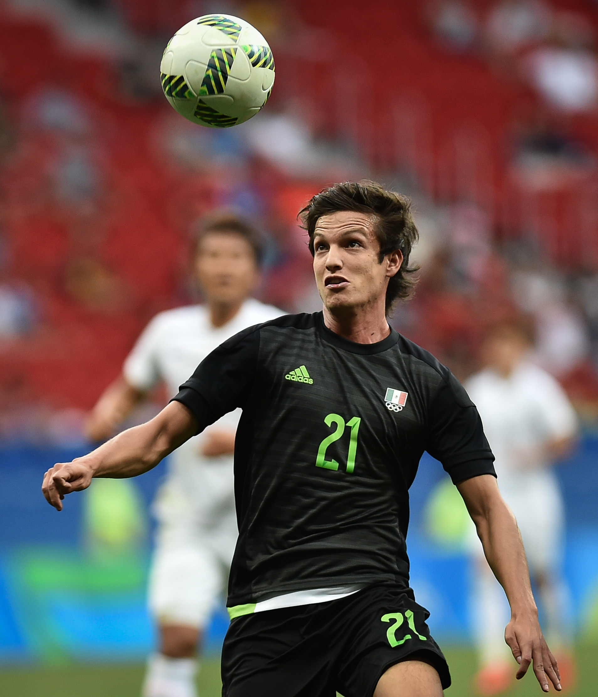 Estádio Nacional de Brasília Mané Garrincha, Brasília, DF, Brasil, 10/8/2016. O time da Coréia do Sul classificou-se para a próxima fase do torneio de futebol masculino da Olimpíada com uma vitória por 1 a 0 contra o México. Kwon Chang-hoon marcou o gol da vitória sul-coreana aos 32 minutos do segundo tempo.